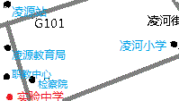 这是关于凌源市实验中学的地址以及周边道路、标志性建筑的地图。